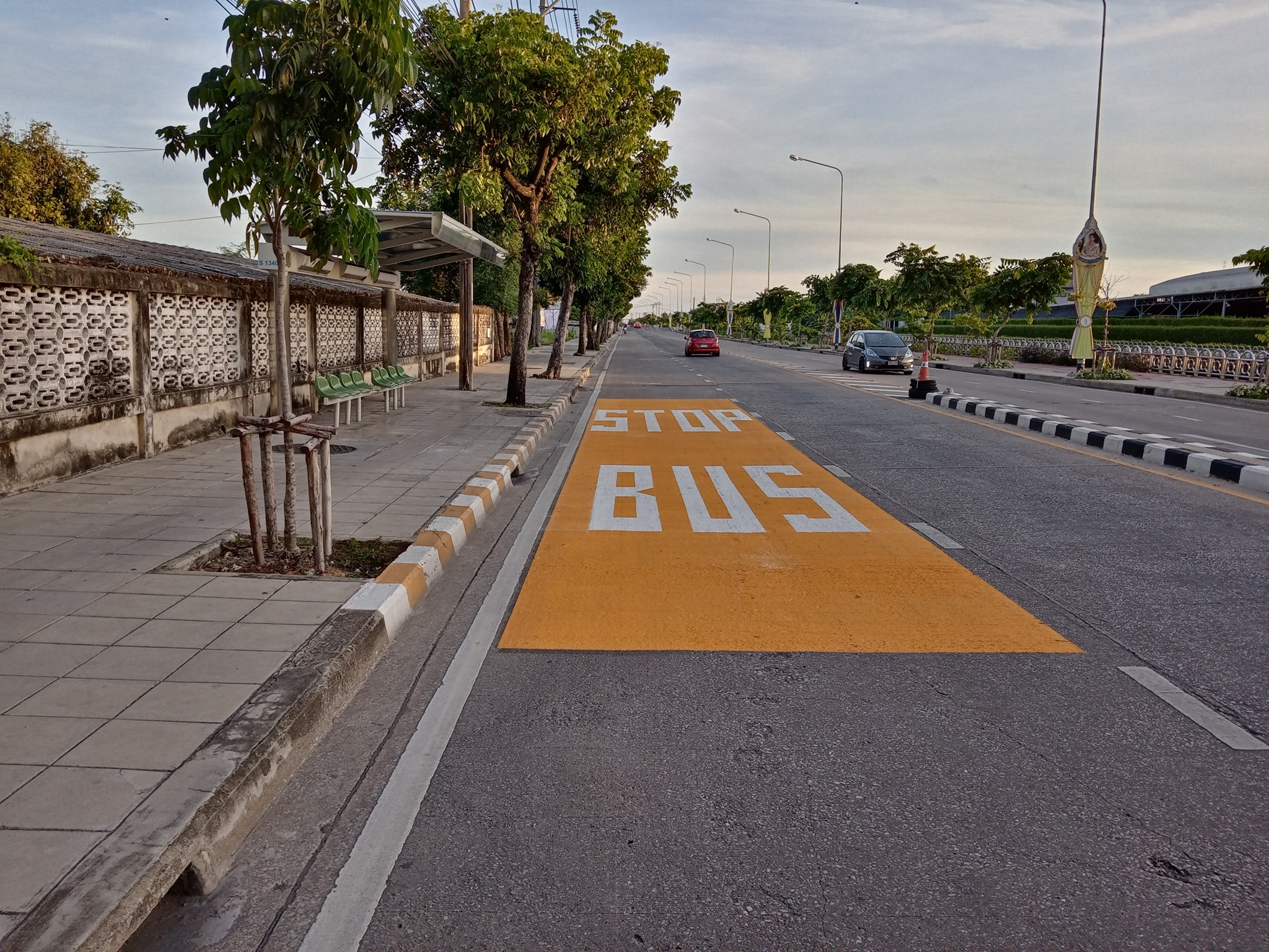 ป้ายรถเมล์ ถนนทวีวัฒนา (ถนนเลียบคลองทวีวัฒนา) เขตหนองแขม